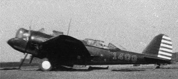 马丁139WC（1403号机），纸片轰炸时徐焕昇座机